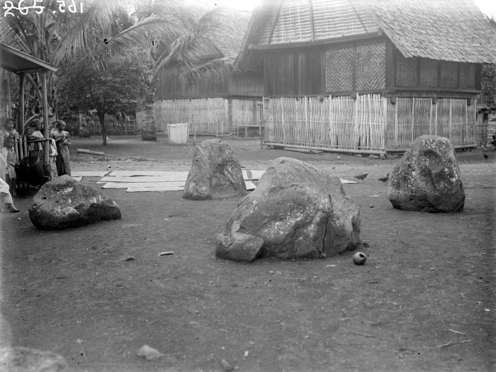 Negatief. Megalieten in Goenoengmegang